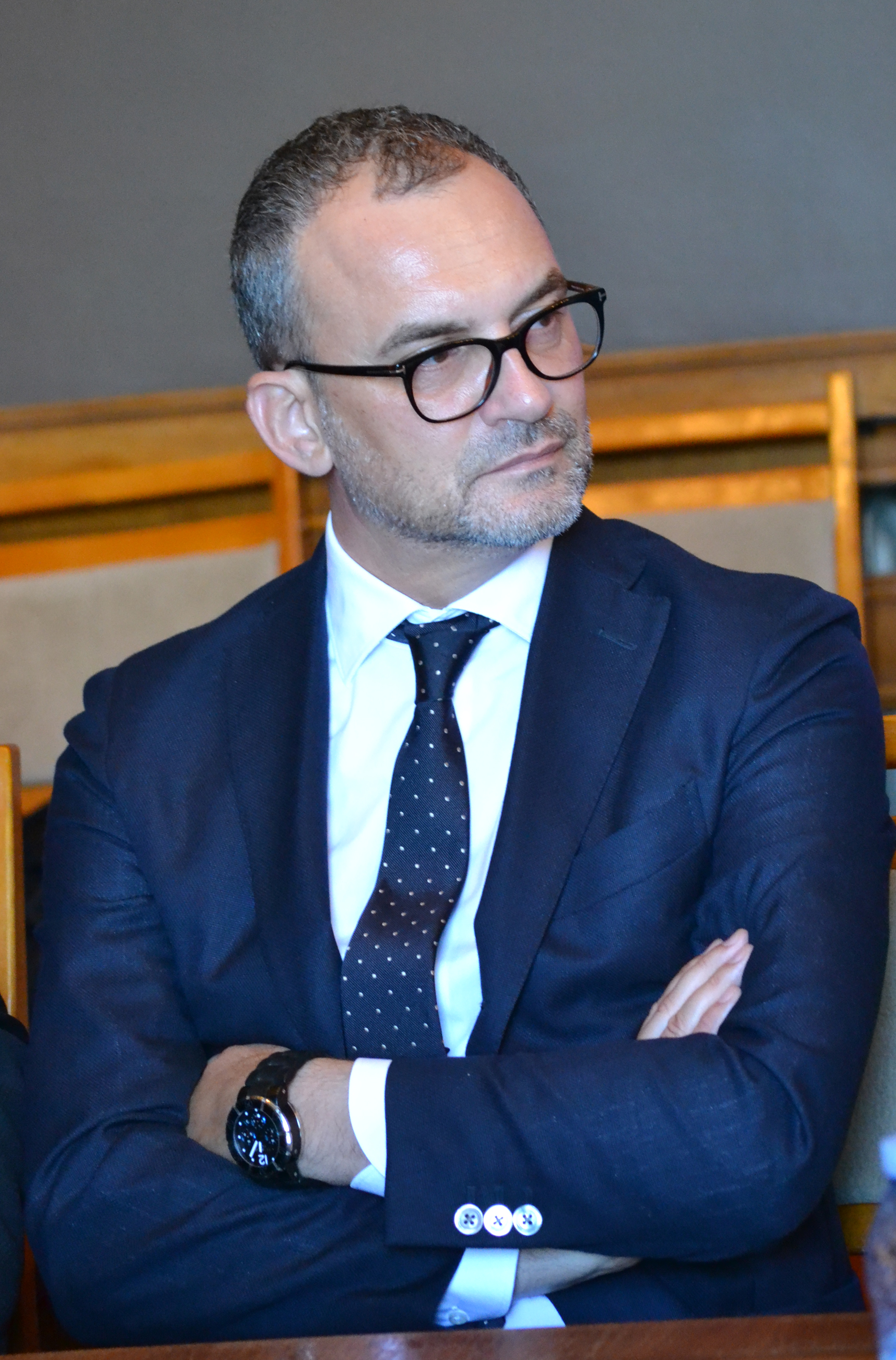 Георги Текев